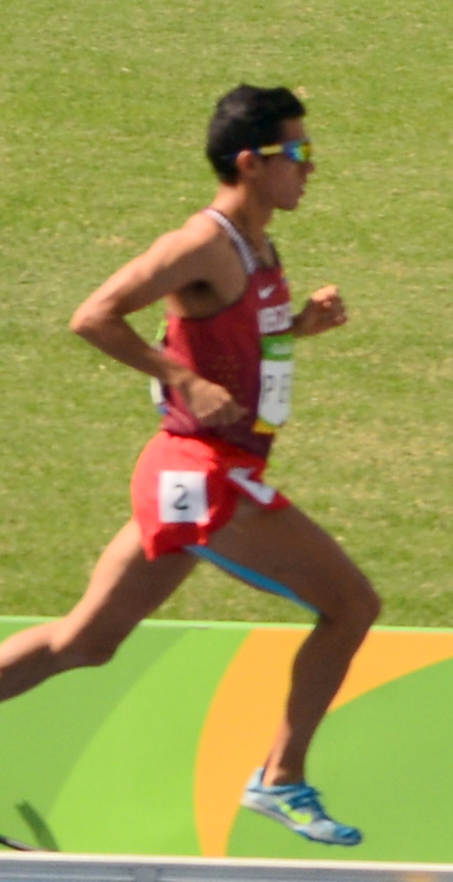 Série du 3000m steeple Homme des JO de Rio, 2016